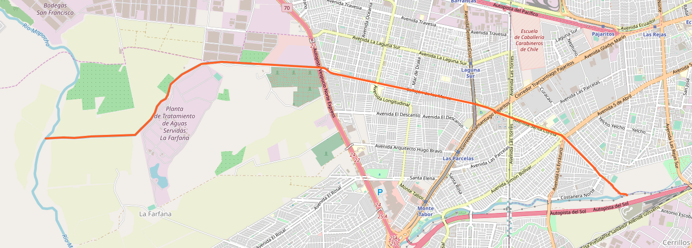 Canal Ortuzano en la ciudad de Santiago de Chile